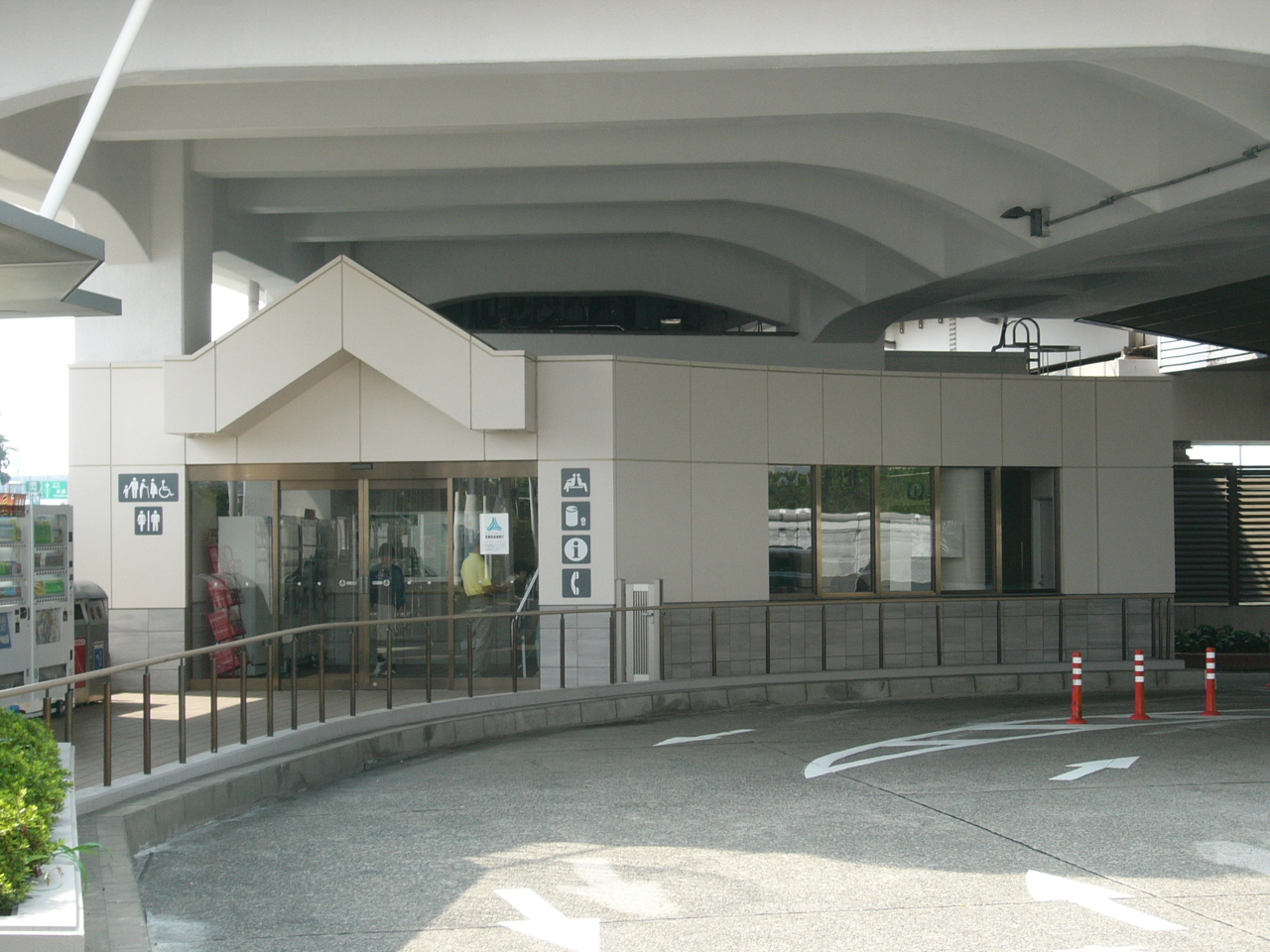 Shimura Parking Area